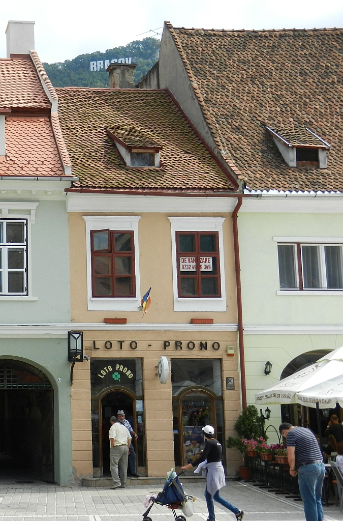 Fosta farmacie „La Harap”